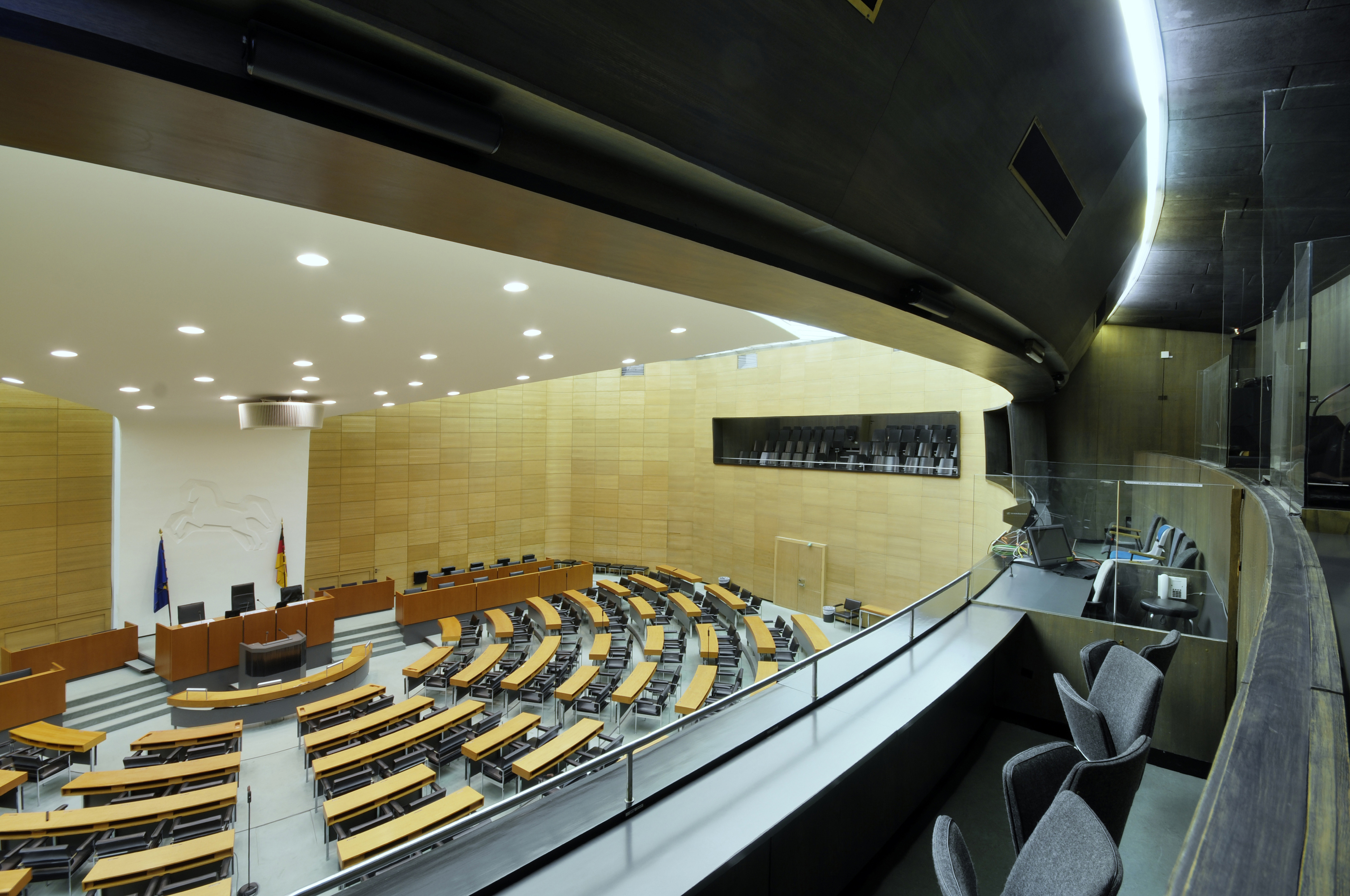 Landtag Niedersachsen, Hannover Wikipedia im Landtag – Niedersachsen 19. März 2013 in HannoverDieses Bild entstand während eines Fototermins im Niedersächsischen Landtagsgebäude in Hannover vor dem geplanten Abriß und Neubau bis 2017. Die Landtagsverwaltung hat uns gestattet, alle Räume zu dokumentieren.